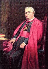 Bischof Ferdinand Brossart, Covington